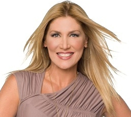 Maite Delgado.